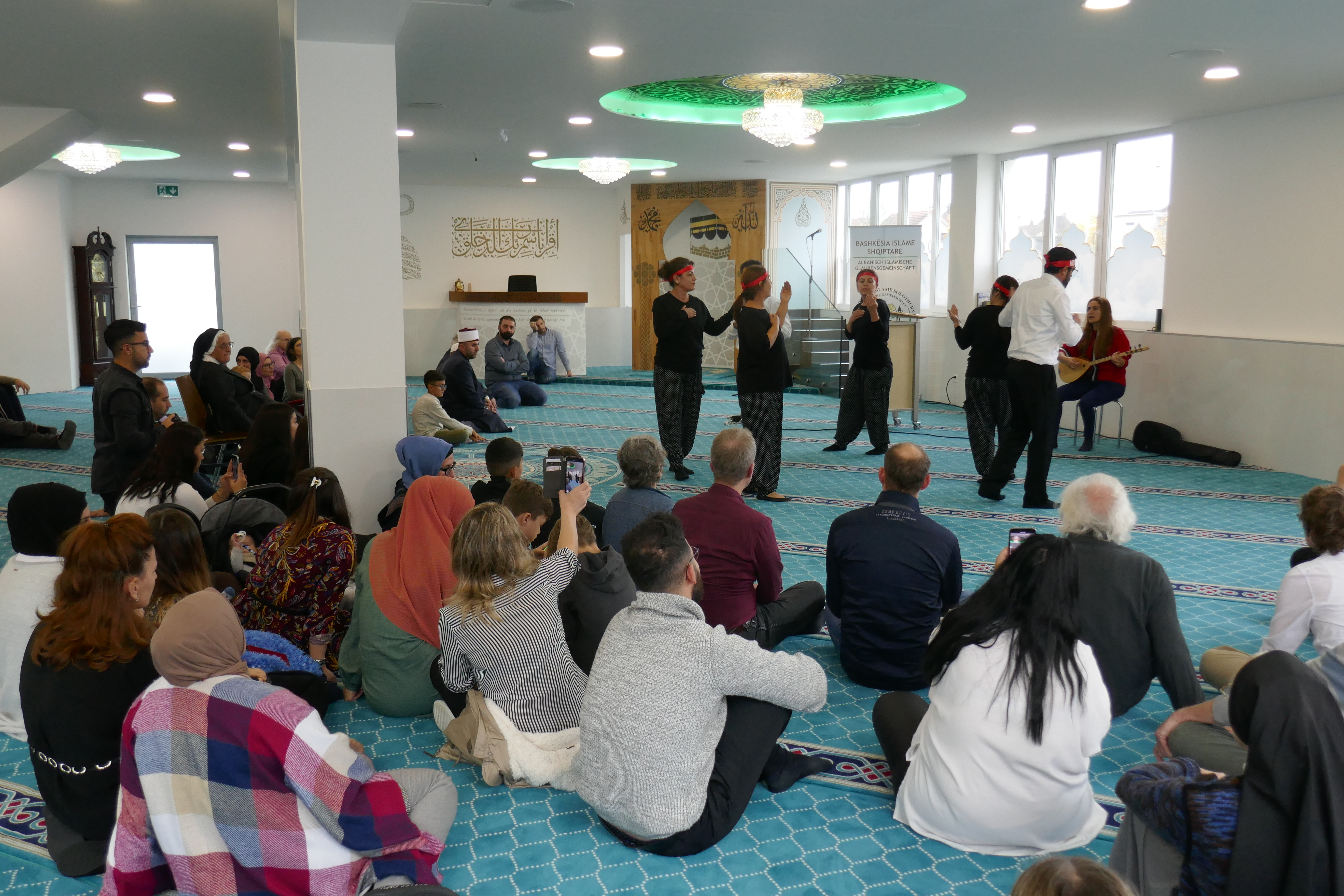 Besuch in der Moschee Zuchwil (CH) während der Woche der Religionen 2019. Aleviten tanzen in der Mosche der Albanisch-Islamischen Glaubensgemeinschaft Baskësia Islame Solothurn.